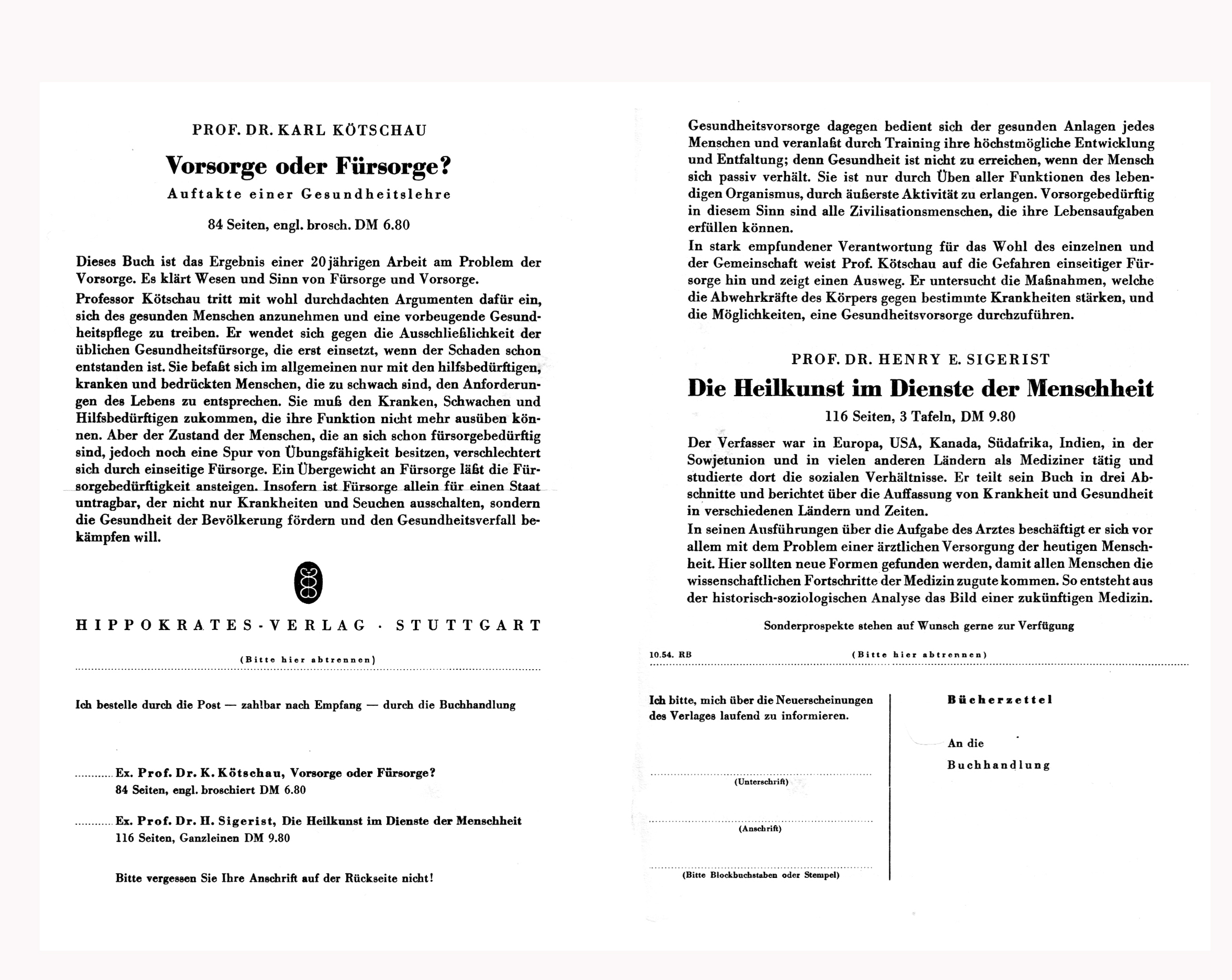 Bücherwerbung